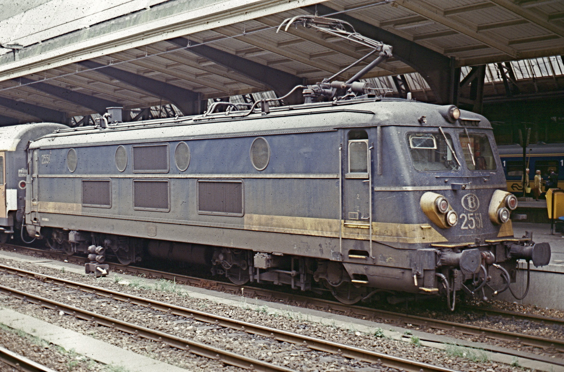 Mehrsystemlokomotive 2551 der SNCB im Bahnhof Amsterdam CS